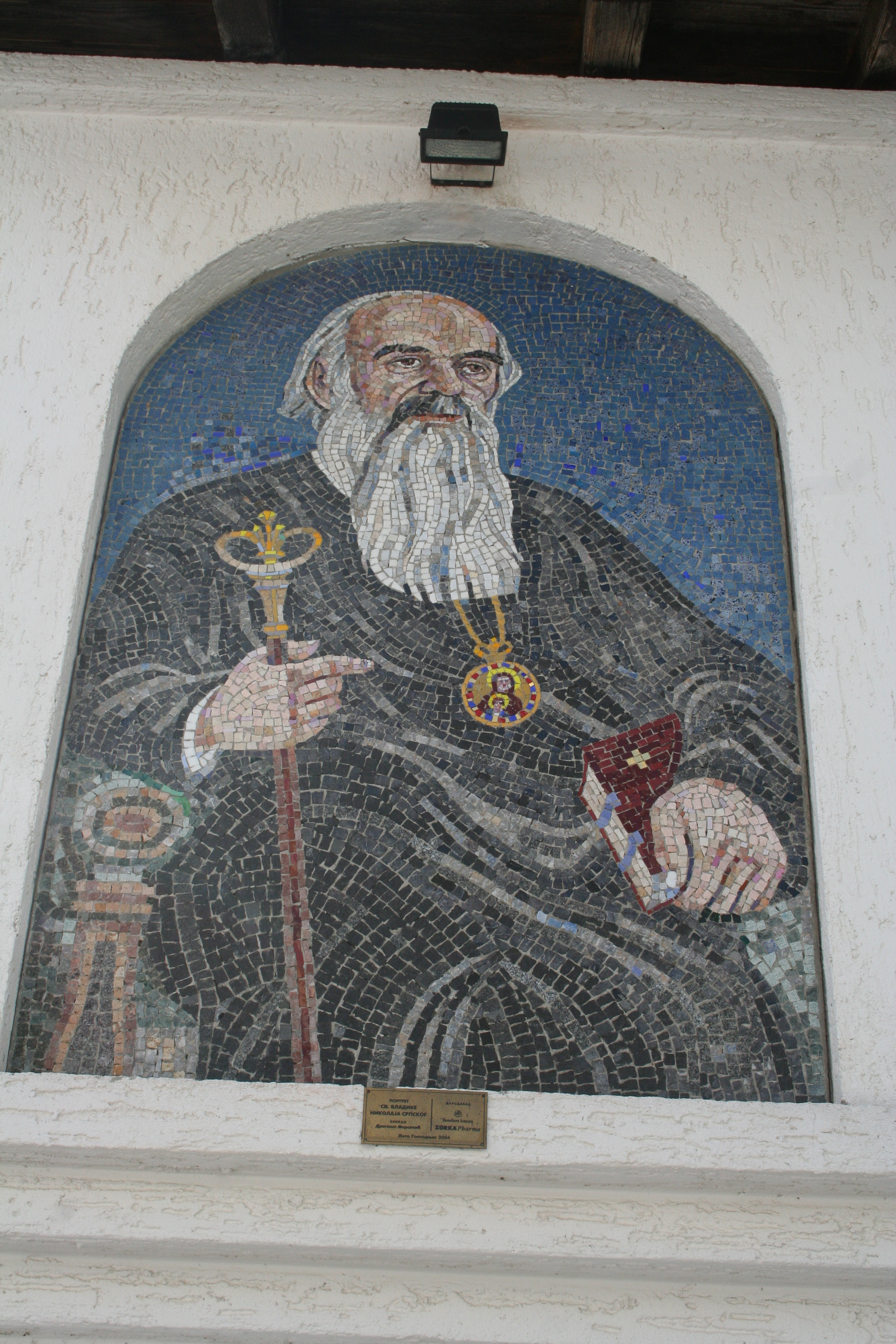 Manastir Svetog Nikolaja - Soko, Ljubovija